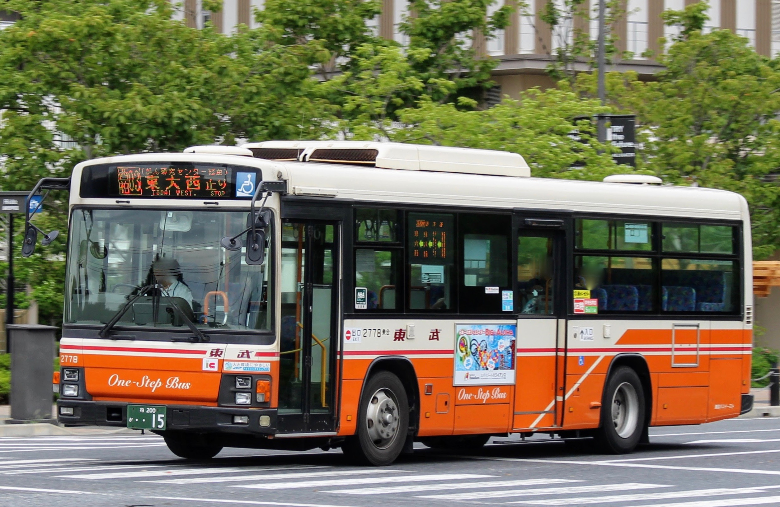 東武バスイースト西柏営業事務所 社2778 いすゞエルガワンステップ 柏の葉キャンパス駅西口付近 2018年8月16日